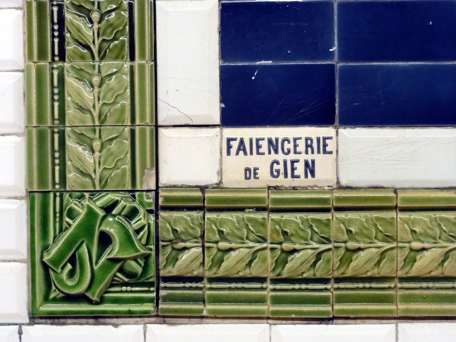 La station Porte de Clichy de la ligne 13 du métro de Paris, France